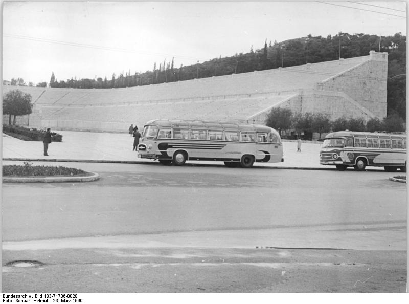 Zentralbild Schaar-23.3.1960 Erste Fahrt des FDGB-Urlauberschiffes "Völkerfreundschaft". Ende Februar 1960 startete das erste FDGB-Urlauberschiff "Völkerfreundschaft" zu einer 27tägigen Ferienreise von Rostock aus ins Mittel- und Schwarze Meer. UBz: Das olympische Stadion in Athen.